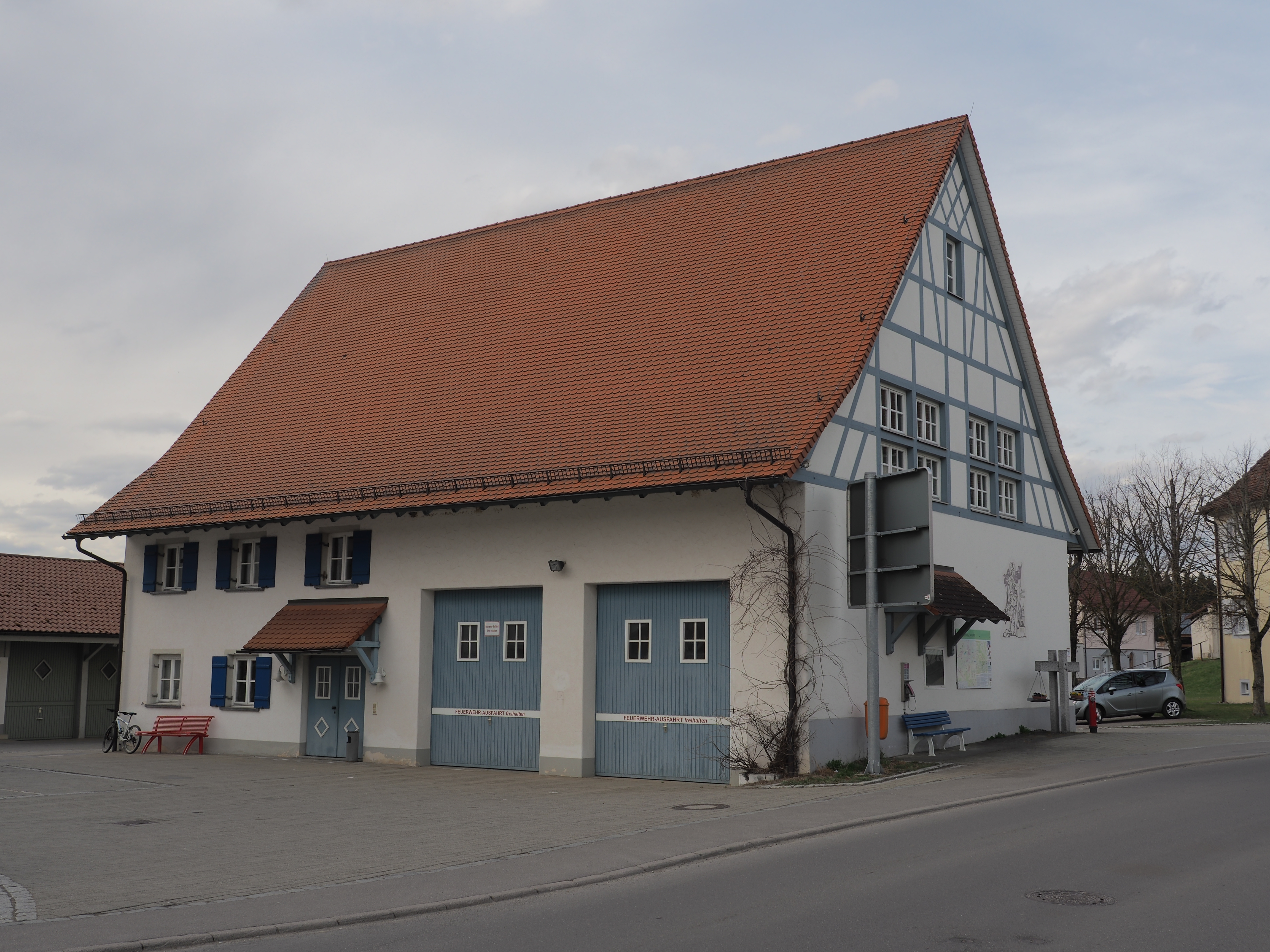 Feuerwehr- und Vereinshaus Liggersdorf (Gemeinde Hohenfels)